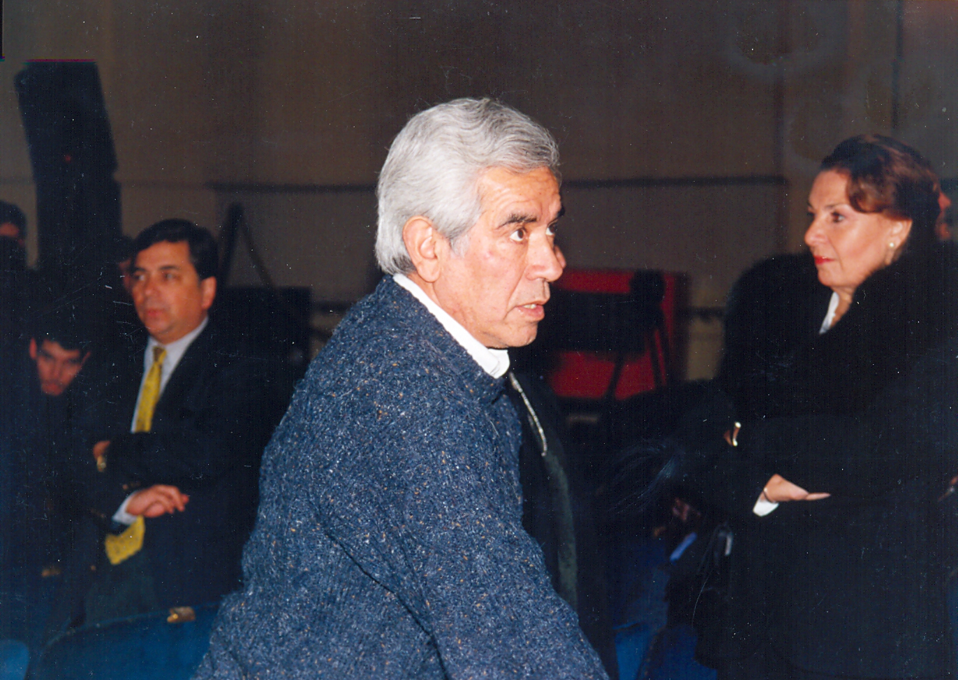 Actor Jorge Yañez